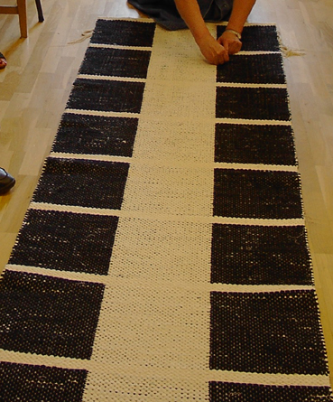 Dubbelvävd matta med trasor. Se även Rätan